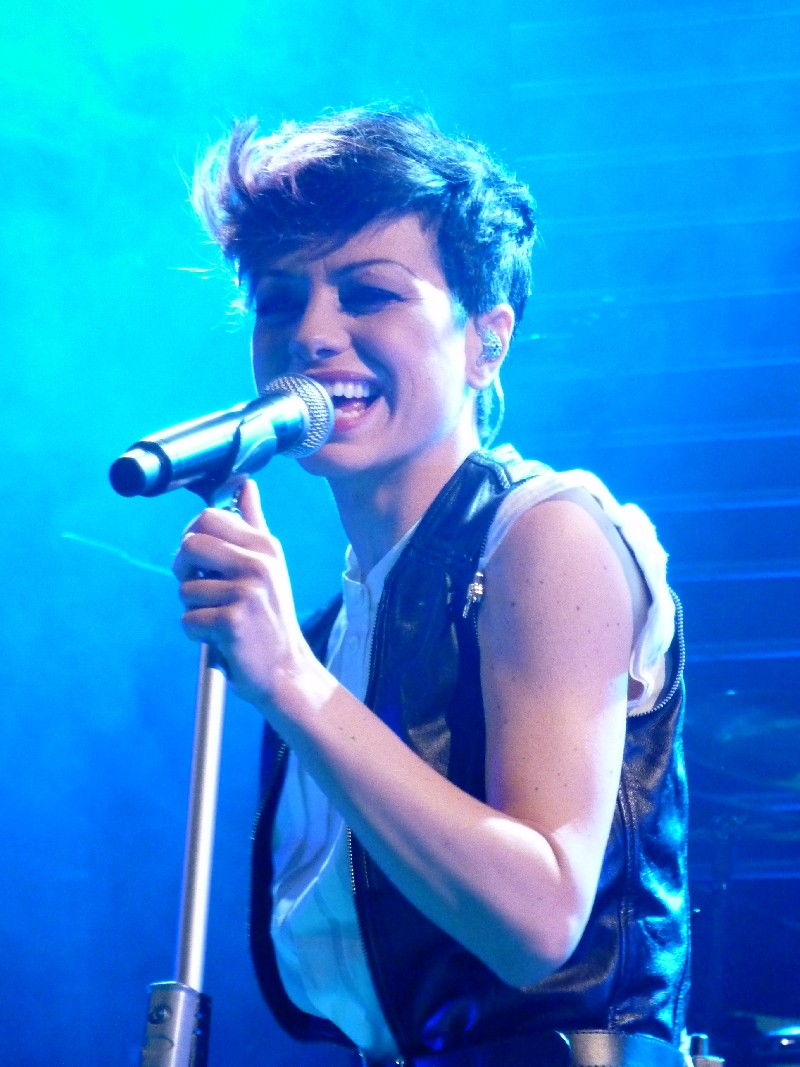 Evoluzione della Specie Tour - 'Data Zero' ~ Belluno ~ 09-06-2011